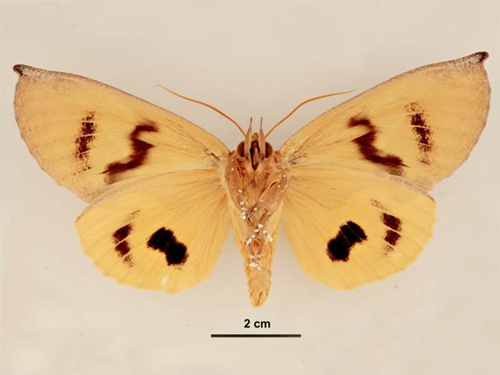 Eudocima aurantia male, ventral view